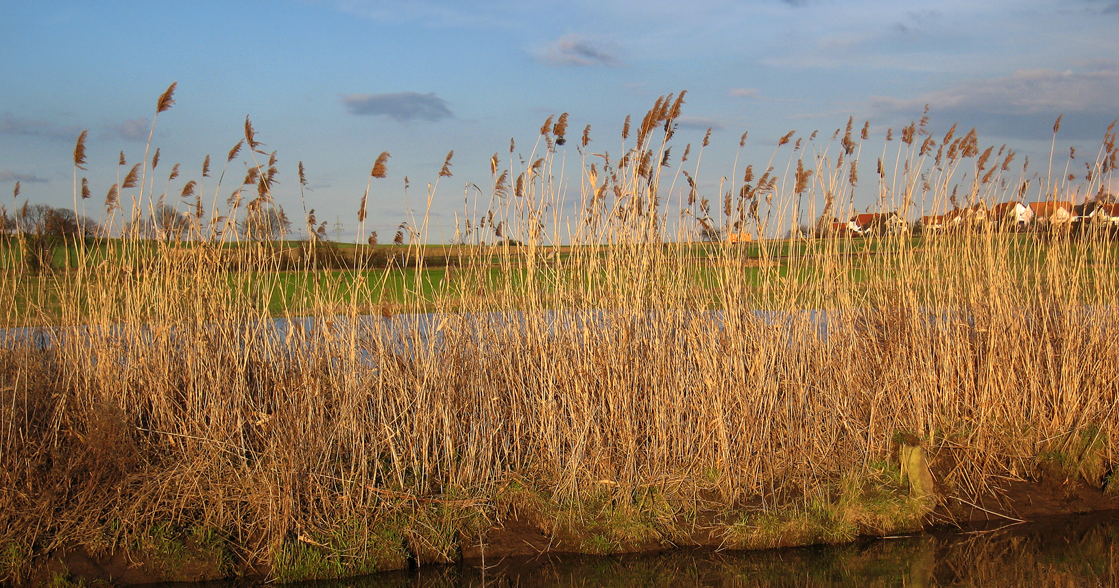 Phragmites australis vom Vorjahr